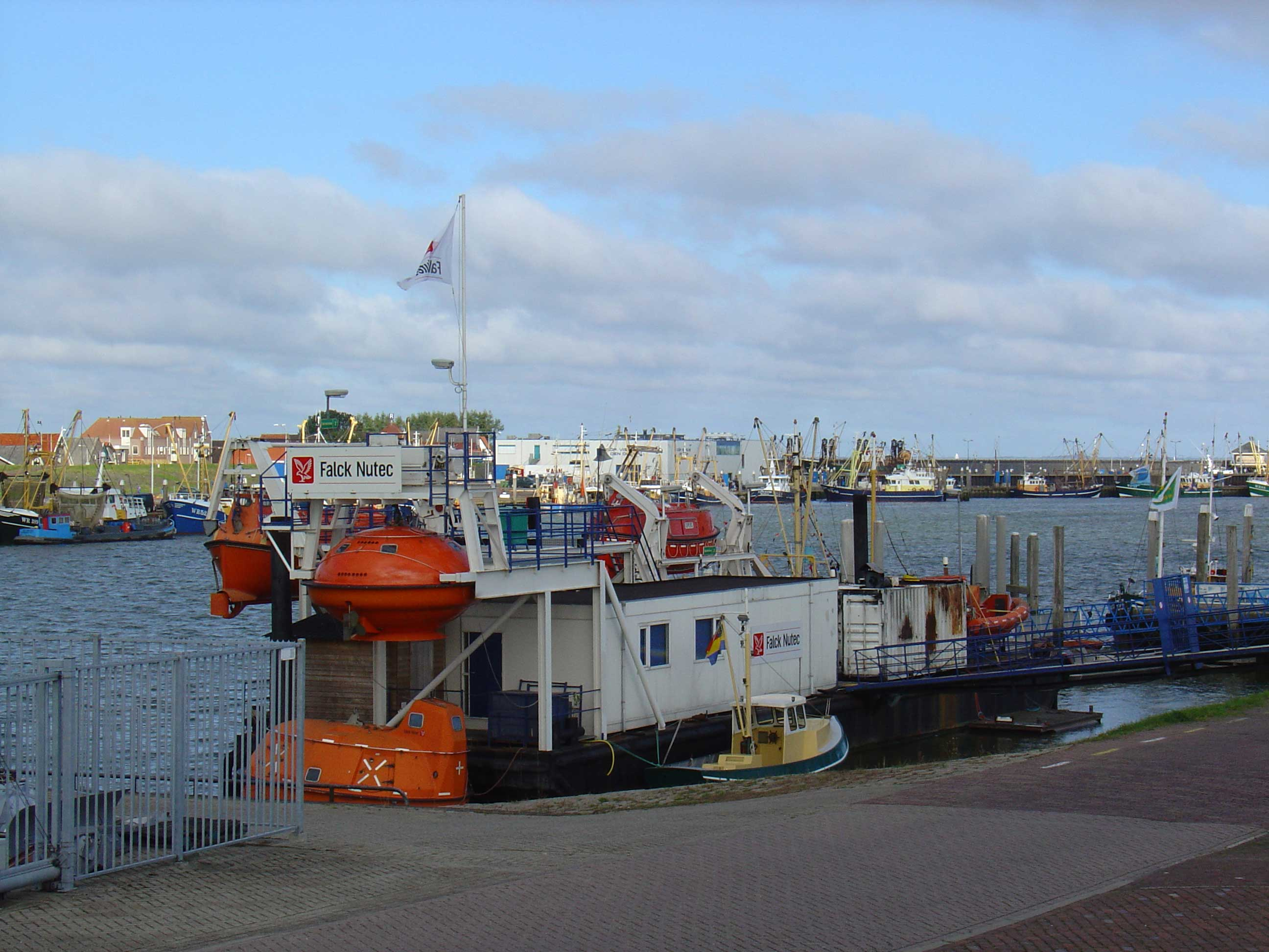 Haven van Den Oever (gem. Wieringen) in Noord-Holland